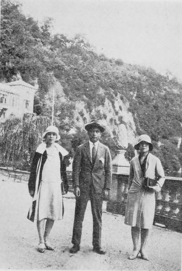 片山安子（右）、岩崎清一郎、原信子 ミラノ